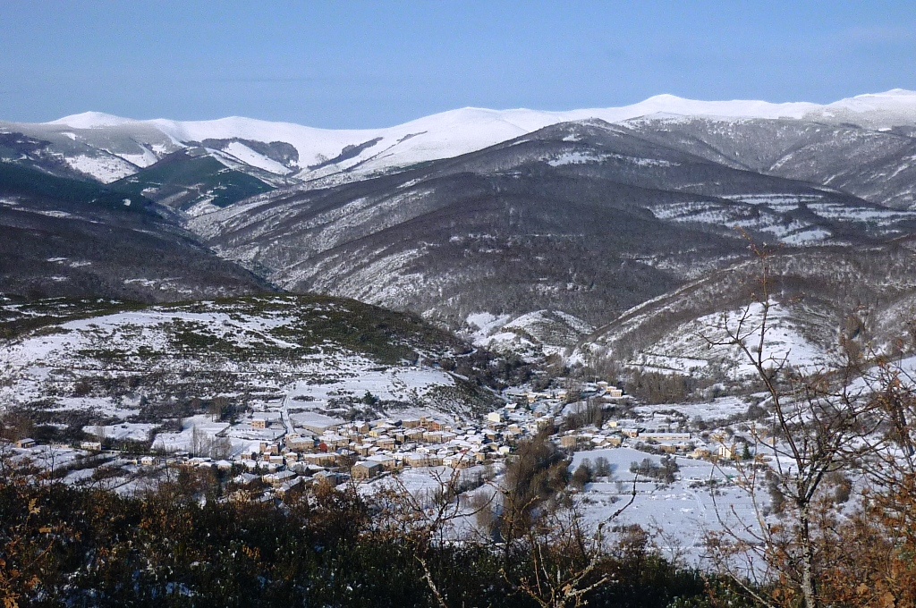 Vista de la Sierra de la Demanda desde el Cerro Motote, en la parte baja Barbadillo de Herreros